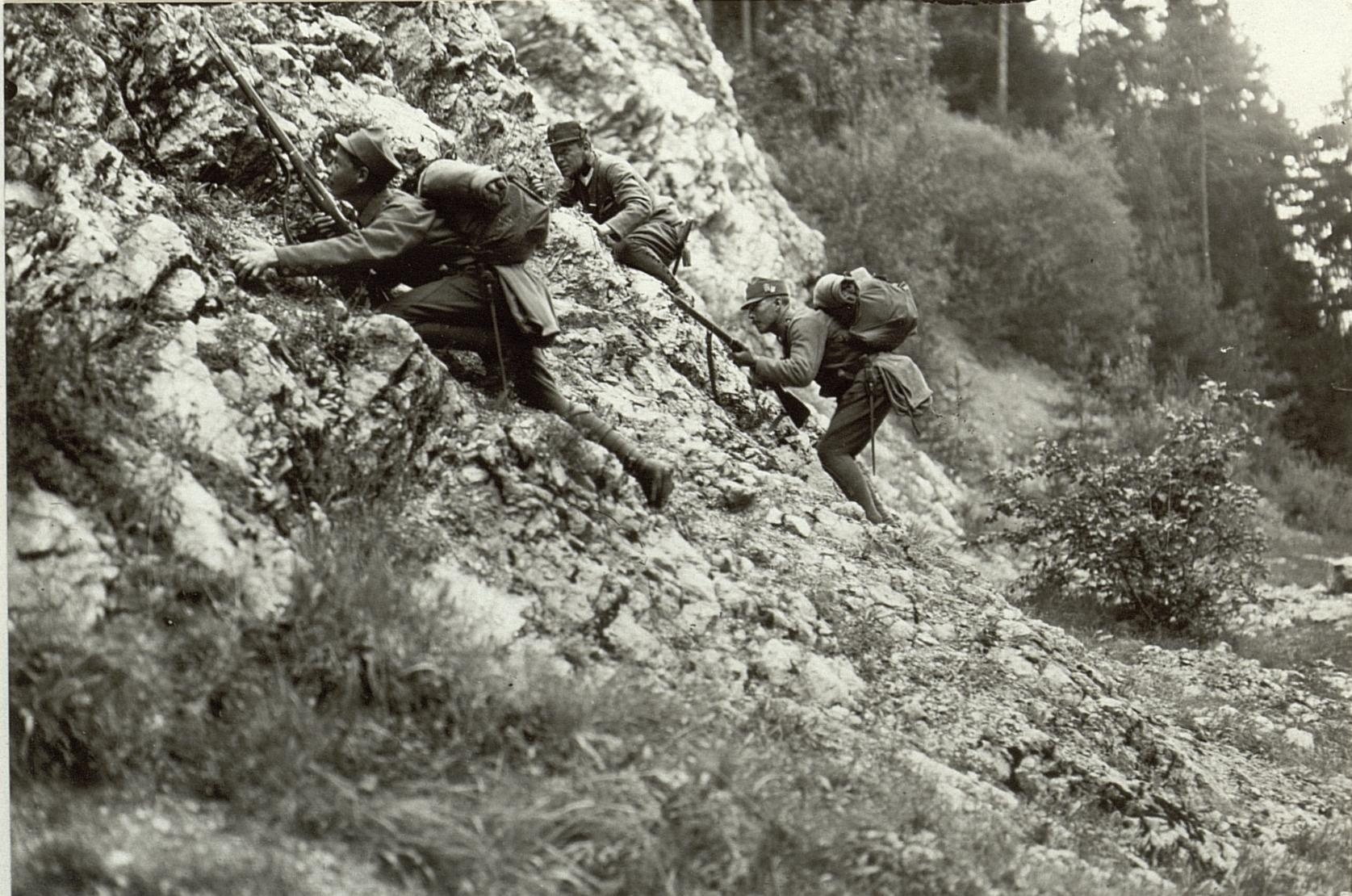 Kriegsalbum 29, Bild 7984